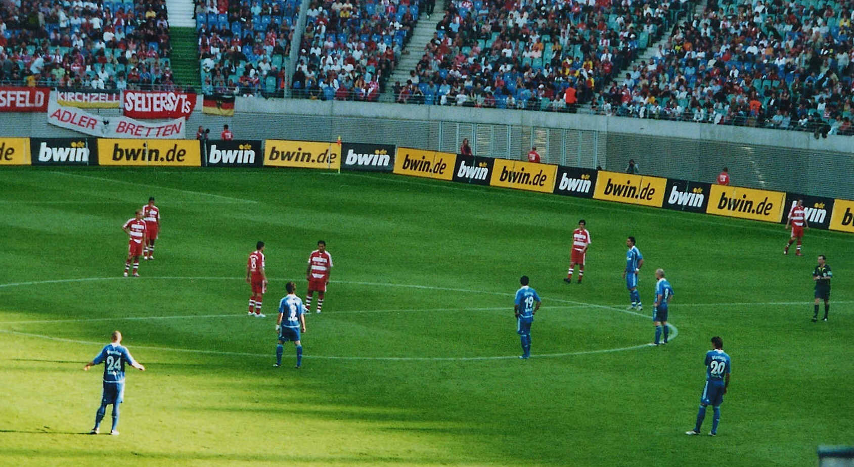 Vor dem Anstoß:Ligapokal-Finale 2007 FCB-S04, Zentralstadion LE